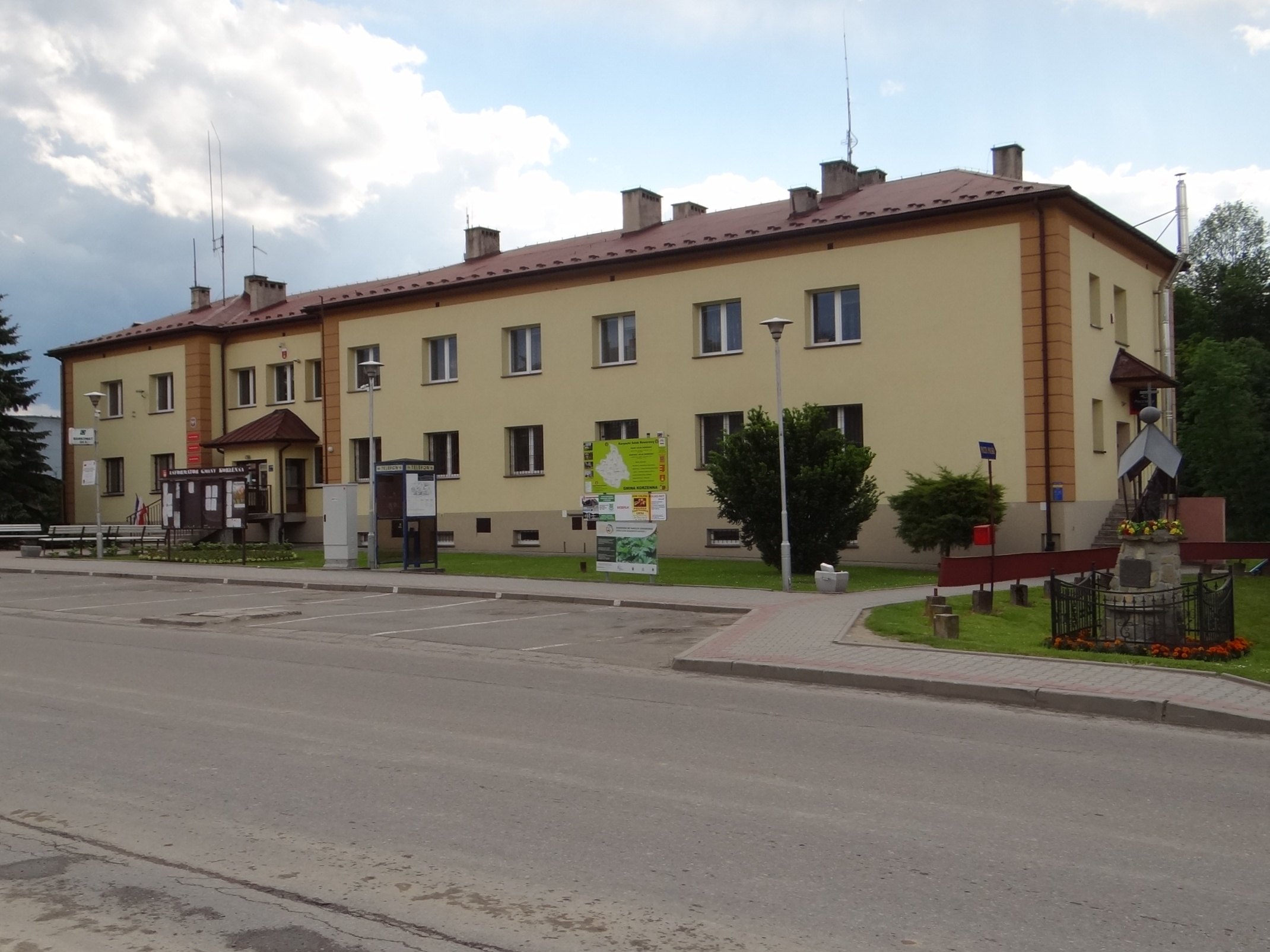 Budynek UG w Korzennej